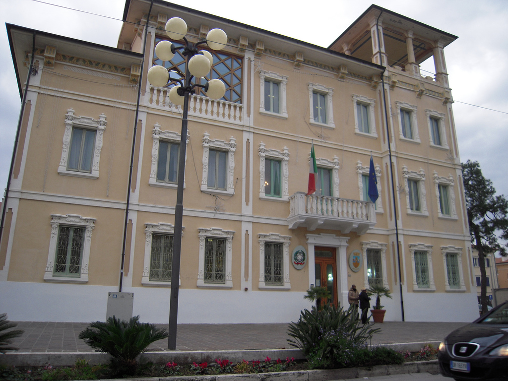 La palazzina sede del municipio di Porto Recanati.